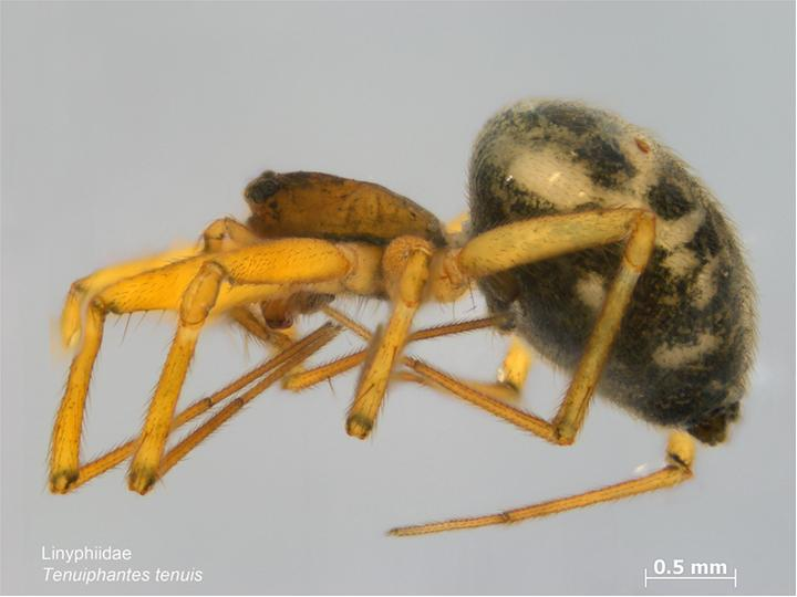 Tenuiphantes tenuis female